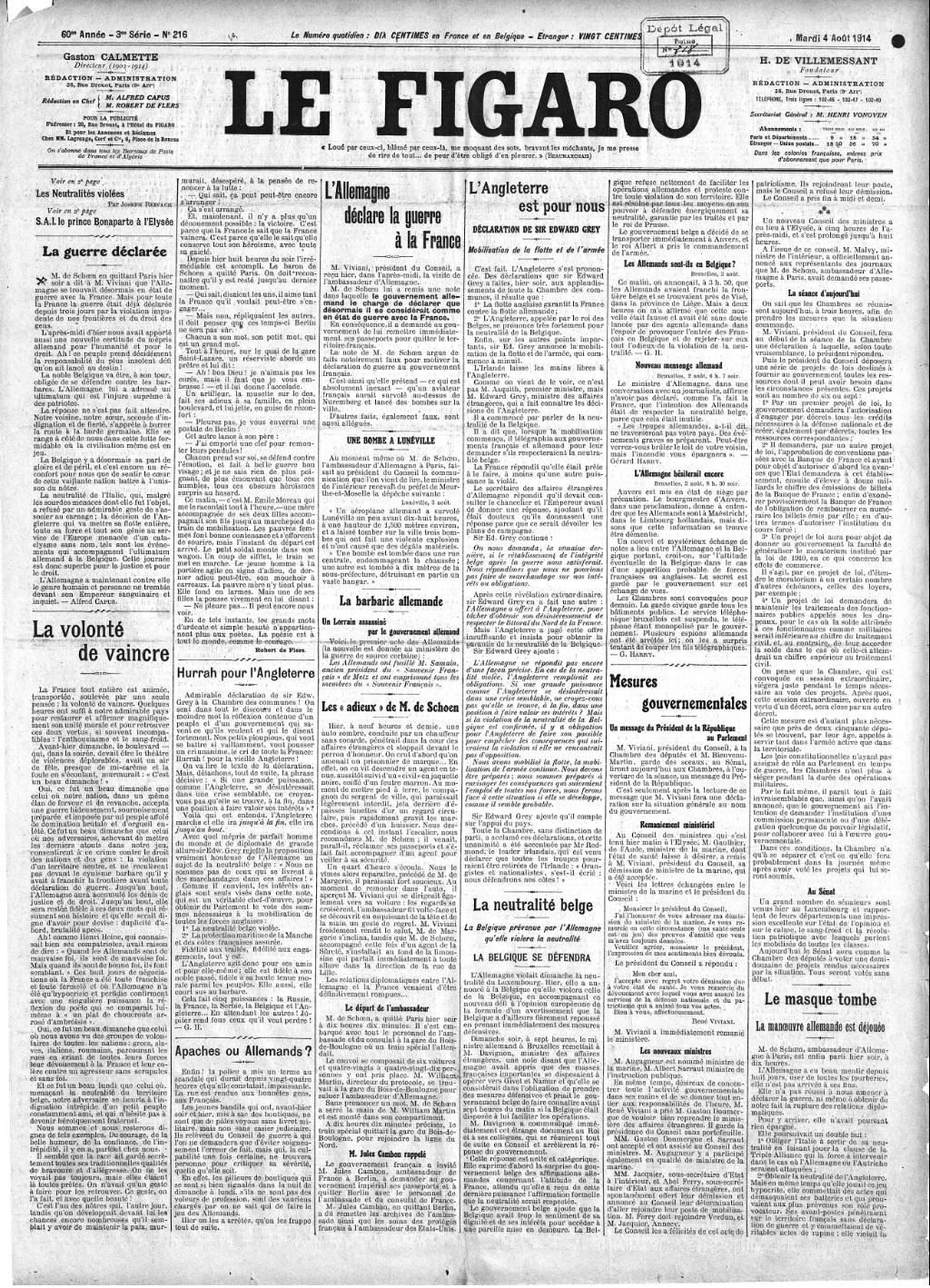 Une du Figaro du 4 août 1914